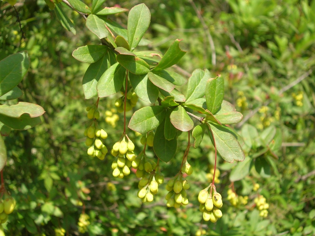 Berberis aristata, Uttarakhand